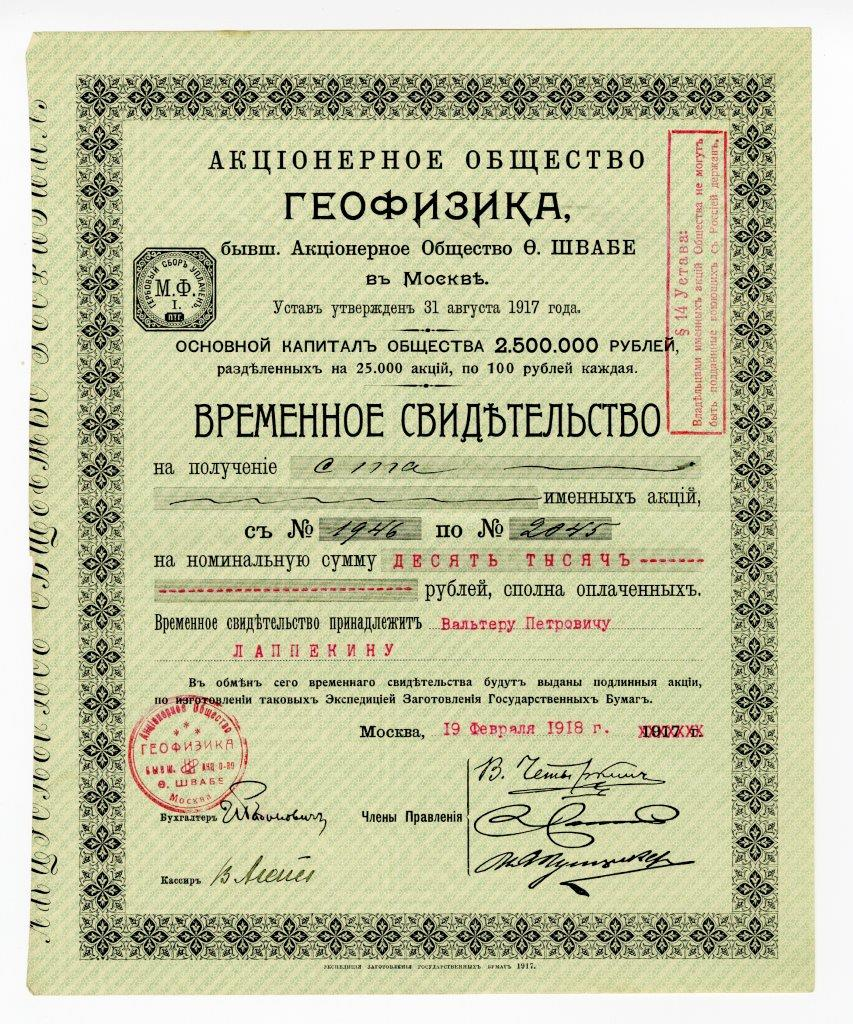 Временное свидетельство на получение ста именных акций на номинальную сумму 10 тыс. руб. сполна оплаченных Акционерного общества "Геофизика" (бывш. Акционерного общества "Ф. Швабе в Москве") с основным капиталом в 2,5 млн. руб. Москва, 19.02.1918 г.